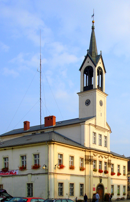 Lubawka - ratusz, 1726, XIX w. (zabytek nr rejestr. 669/J z 11.05.1981)